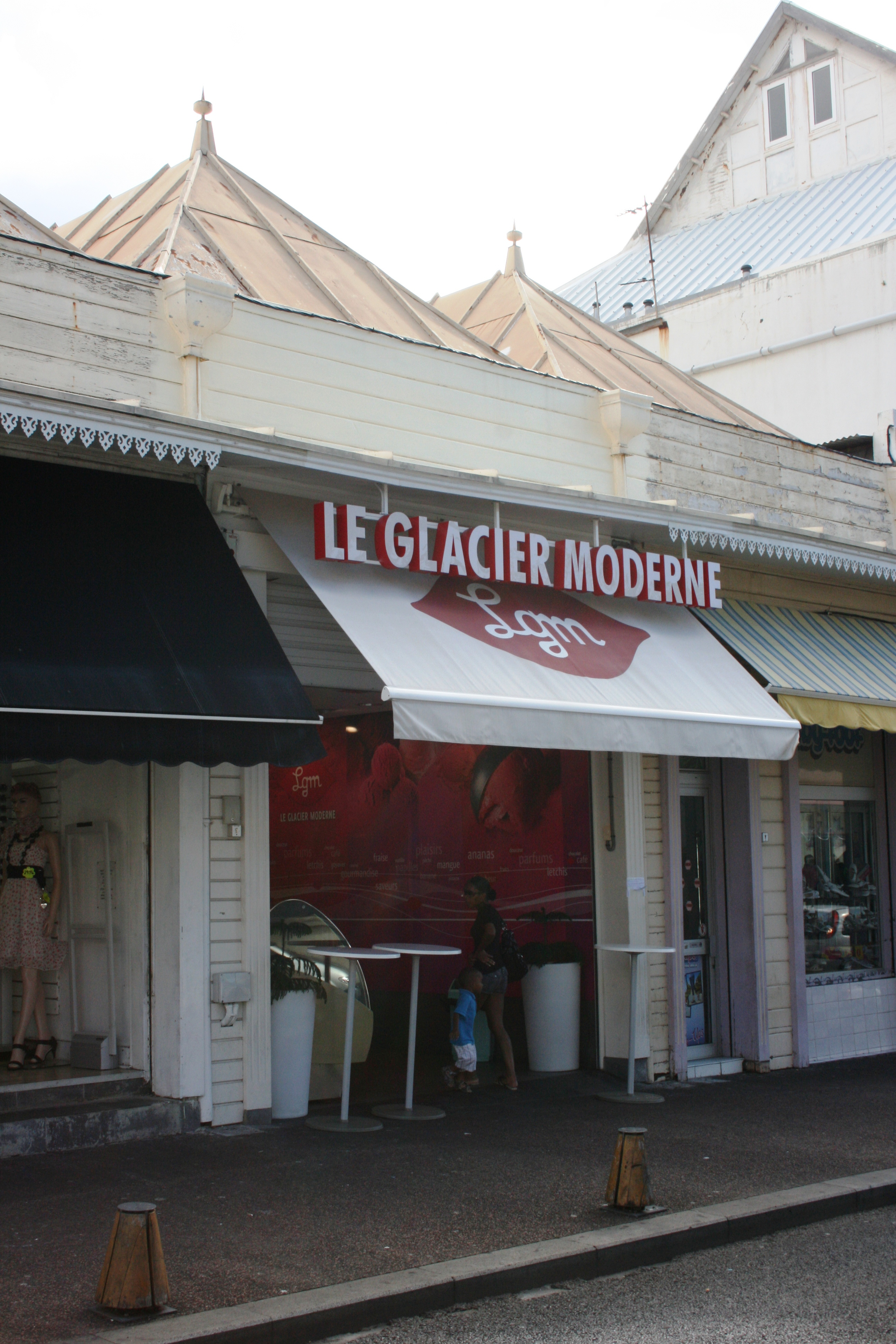 Boutique LGM à Saint-Denis de La Réunion.